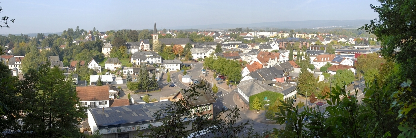 Panorama der Stadt Wadern